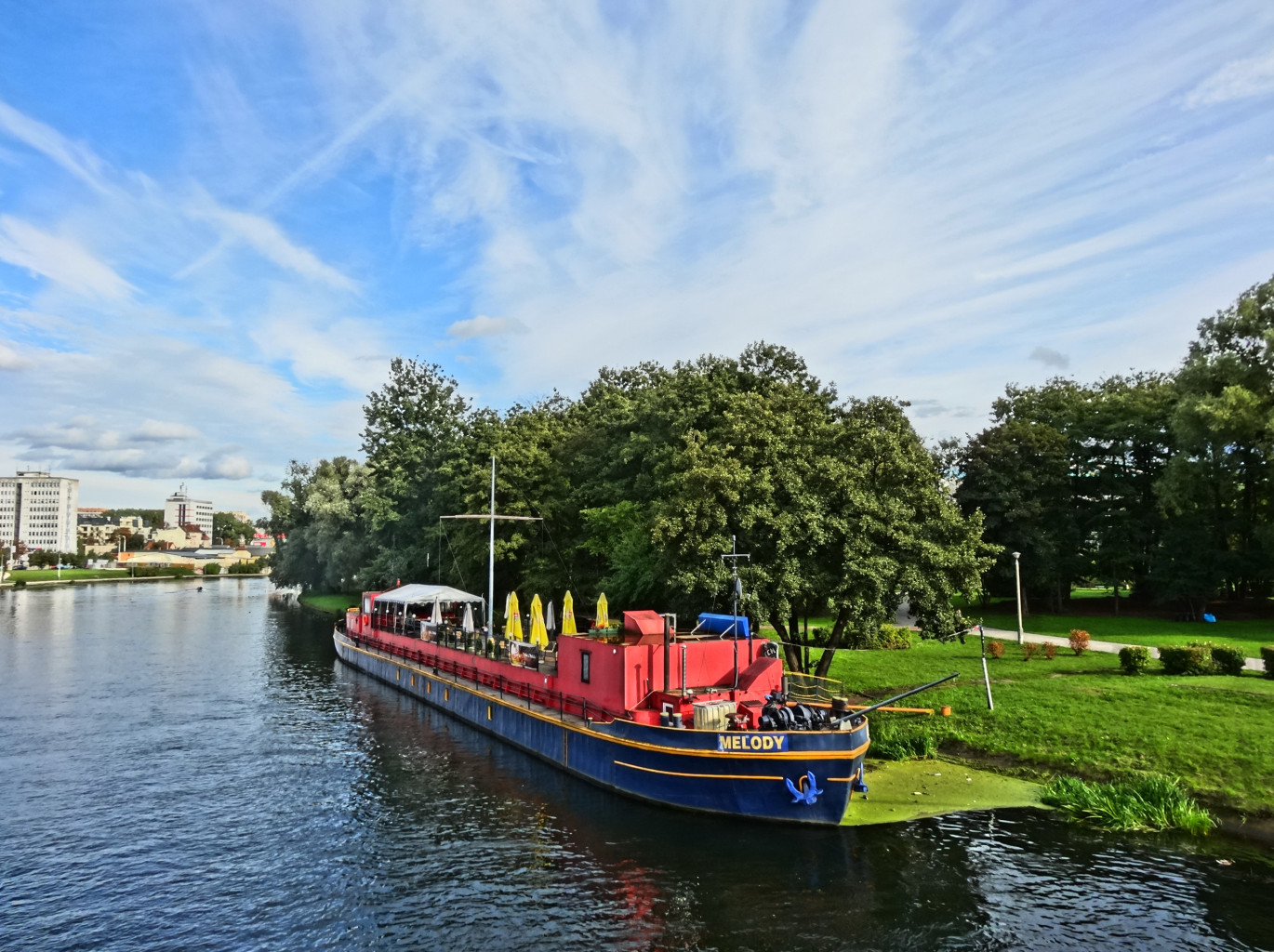 Barka "Melody" z kawiarnią stojąca na nabrzeżu Brdy w Bydgoszczy w pobliżu hali widowiskowo-sportowej "Łuczniczka"